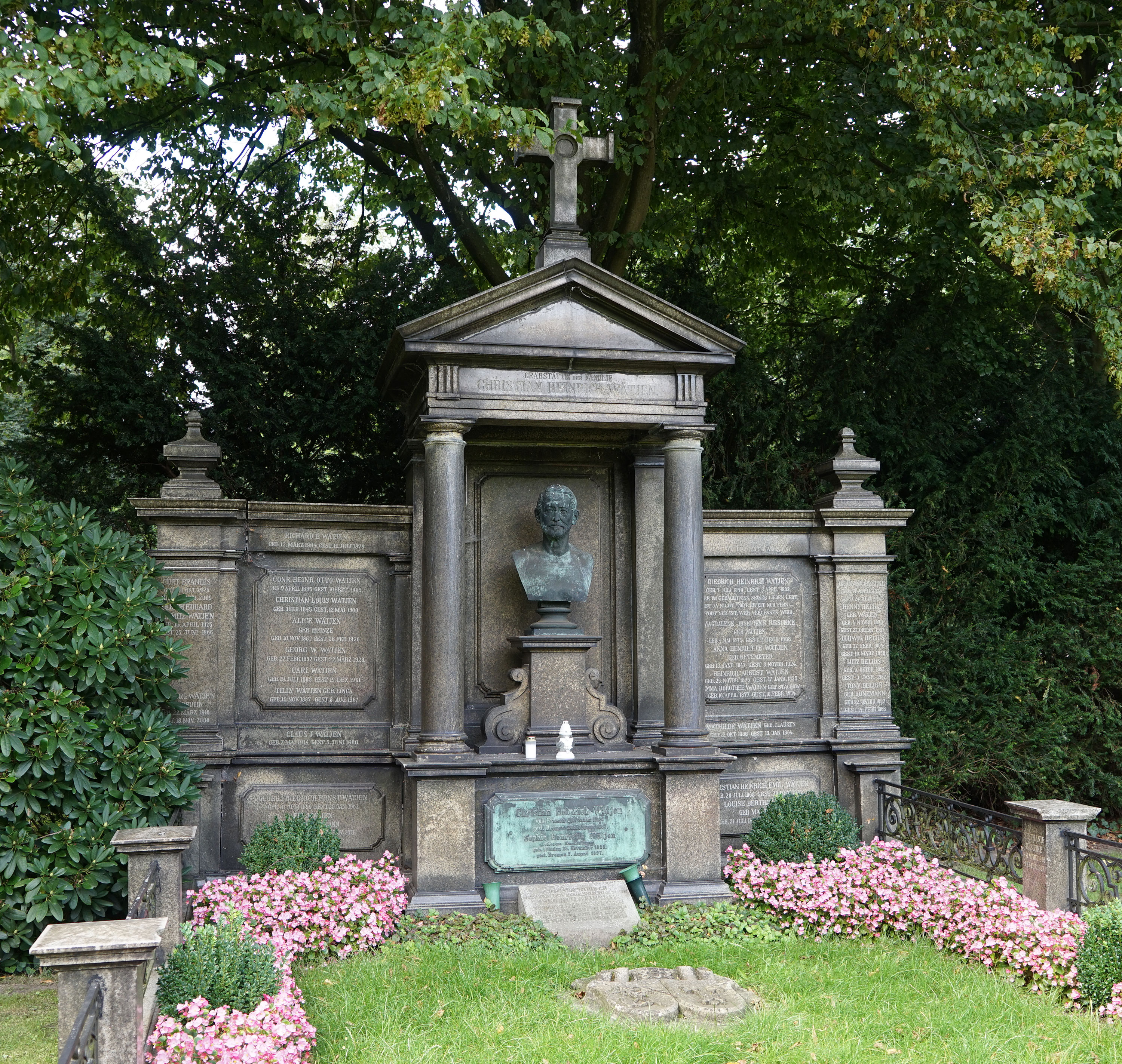 Grabmal Familie Christian Heinrich Wätjen in Bremen, Riensberger FriedhofDas abgebildete Objekt ist ein geschütztes Kulturdenkmal in der Freien Hansestadt Bremen, mit der Nr. 1948,T066 beim Landesamt für Denkmalpflege registriert.